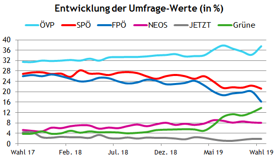 Umfragen Österreich